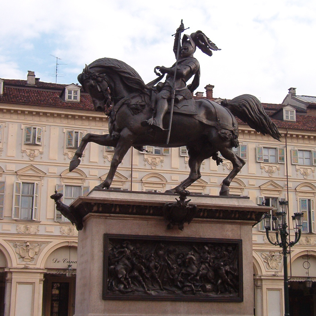 Statua equestre ad Emanuele Filiberto di Savoia - Piazza san Carlo - Torino - Italy